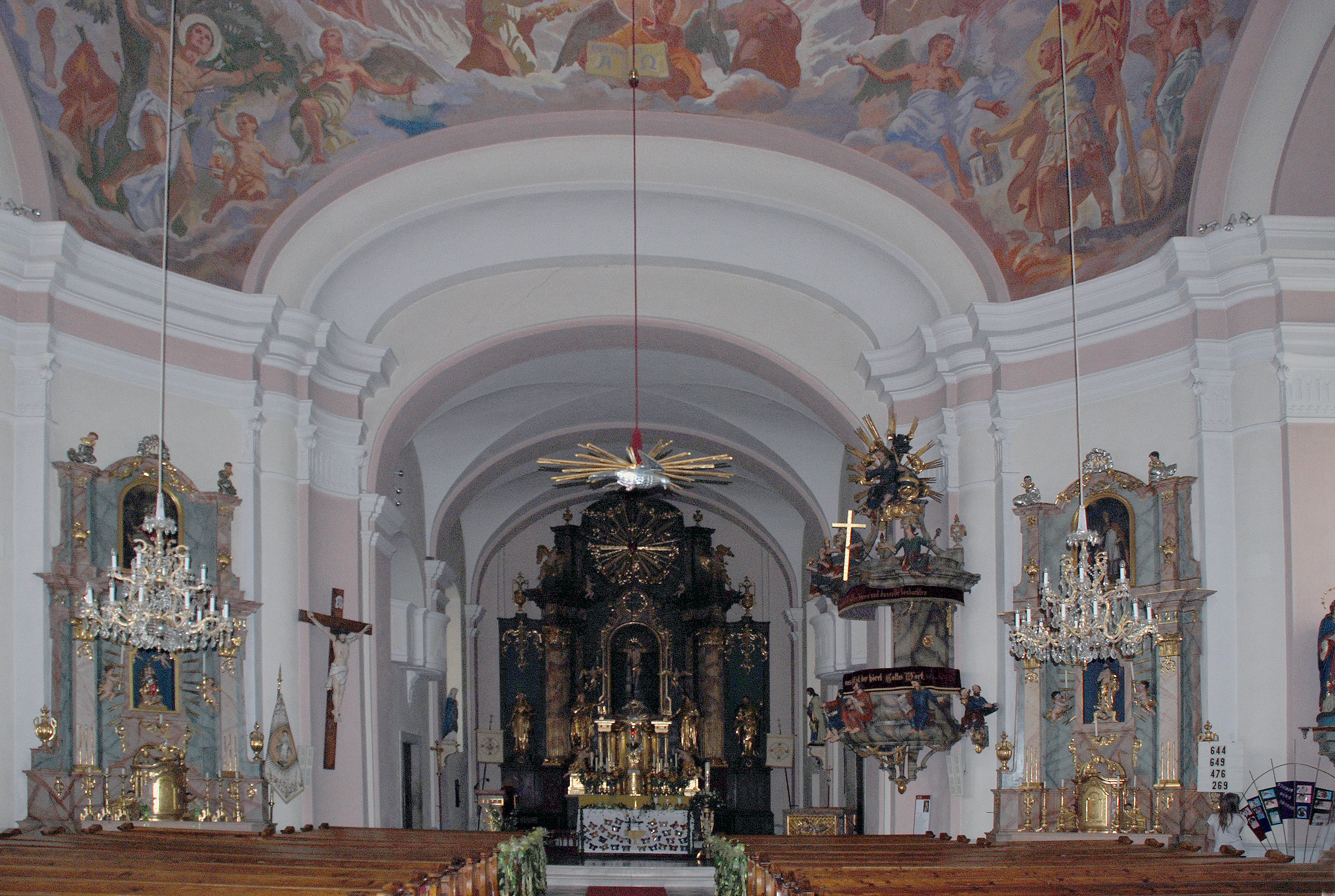 Wies, Steiermark, Österreich: Innenraum der Pfarrkirche